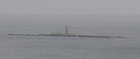 Ynys Dulas, Anglesey